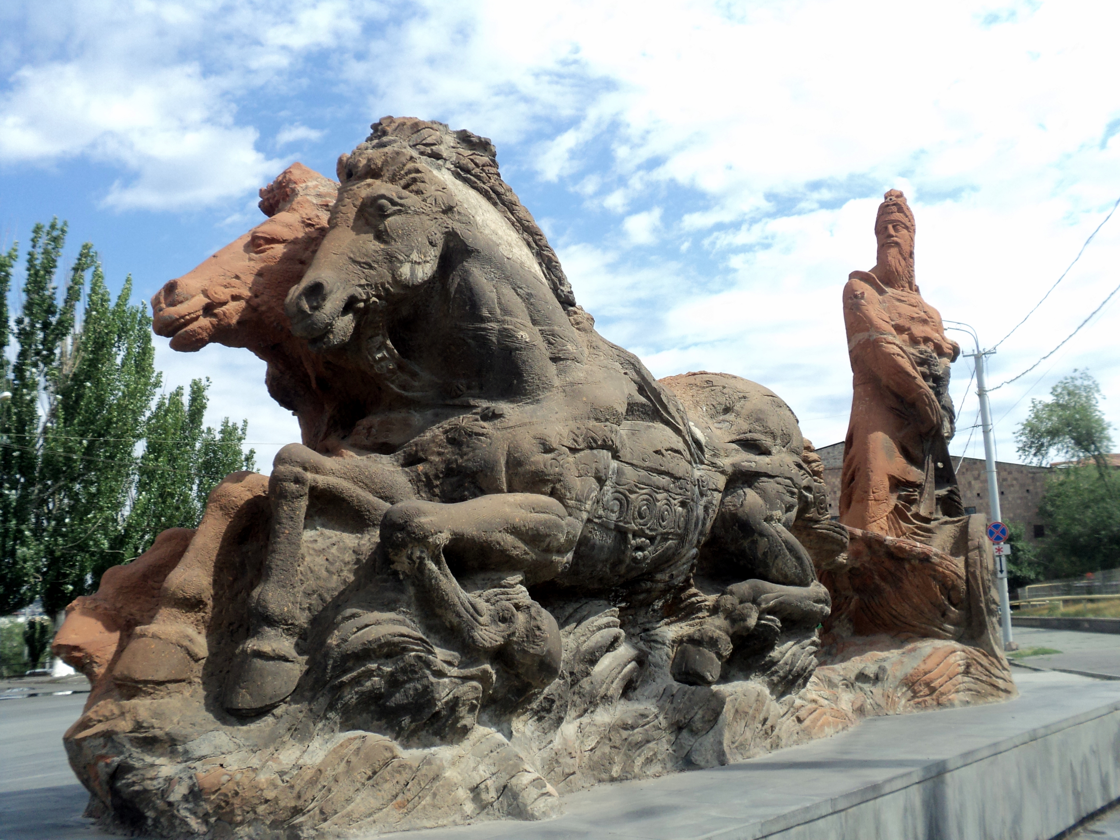 Արգիշտի Ա - տուֆ և բազալտ, հեղինակ` Լևոն Թոքմաջյան, ճարտարապետը՝ Էդվարդ Բասրոյան։ Տեղադրվել է 2002 թվականին Էրեբունի հրապարակում, «Էրեբունի» թանգարանի շենքի դիմաց: 5/19.3